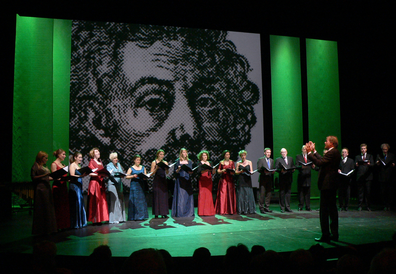 Thomas Hengelbrock mit Balthasar Neumann Chor bei Gala zur Verleihung des Praetorius Musikpreis 2012 im Schauspielhaus Hannover